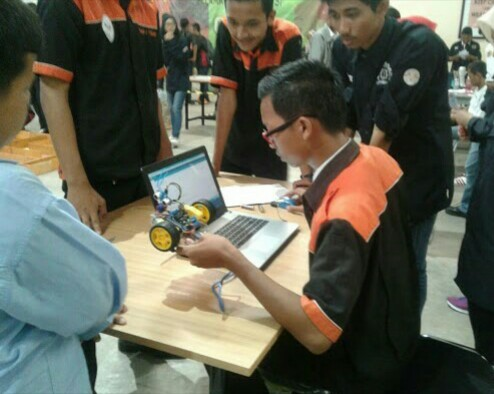 Elektro SMK Negeri 1 Cikampek